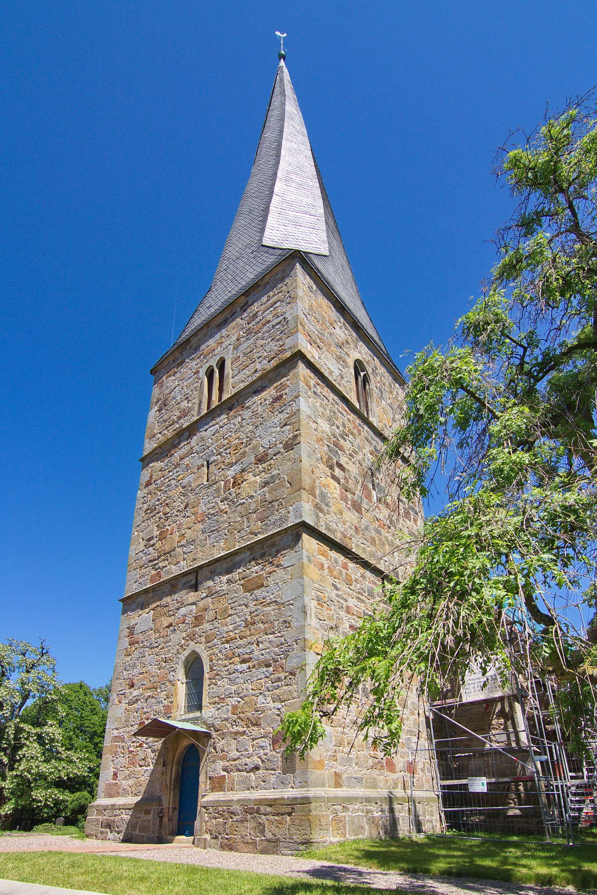 St.Magnus-Kirche von 1499 in Beber (Bad Münder), Niedersachsen, Deutschland.